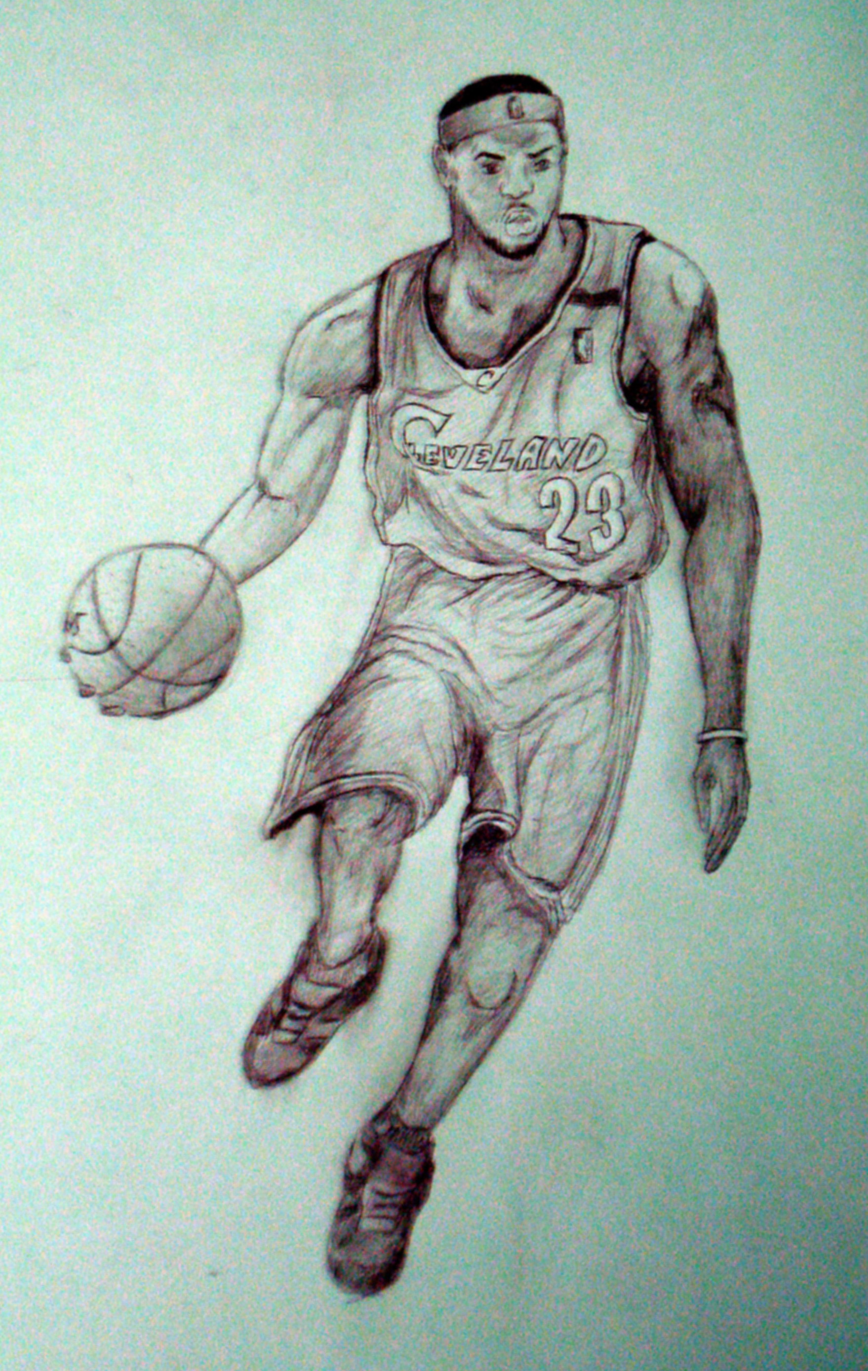 LeBron James, ritratto in un disegno a matita.